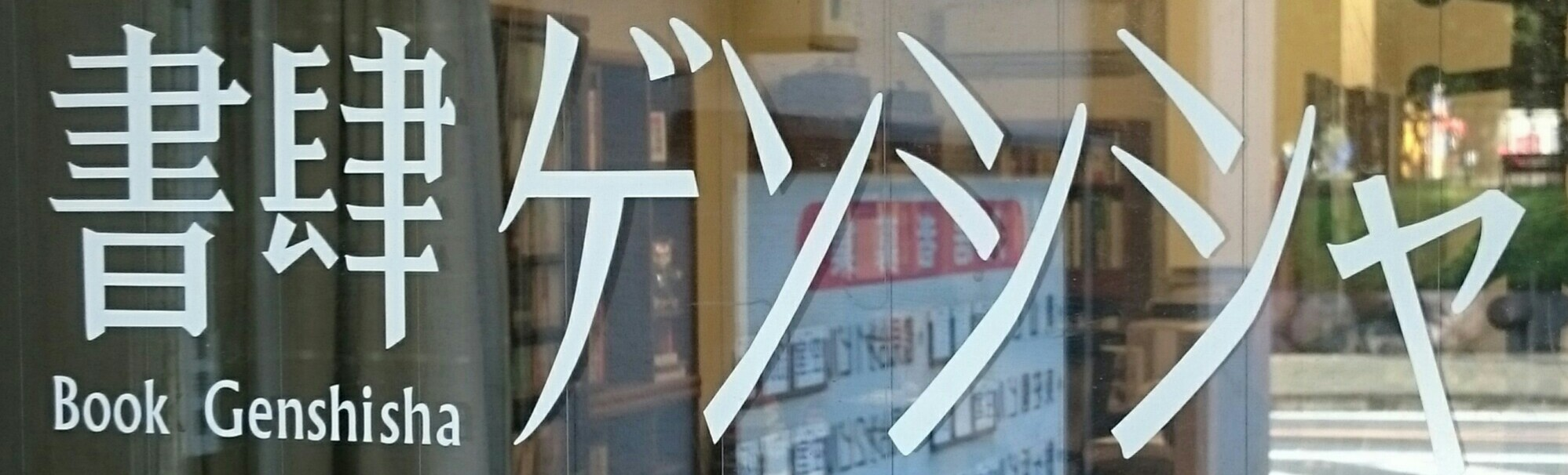 書肆ゲンシシャのロゴ。2018年9月15日撮影。